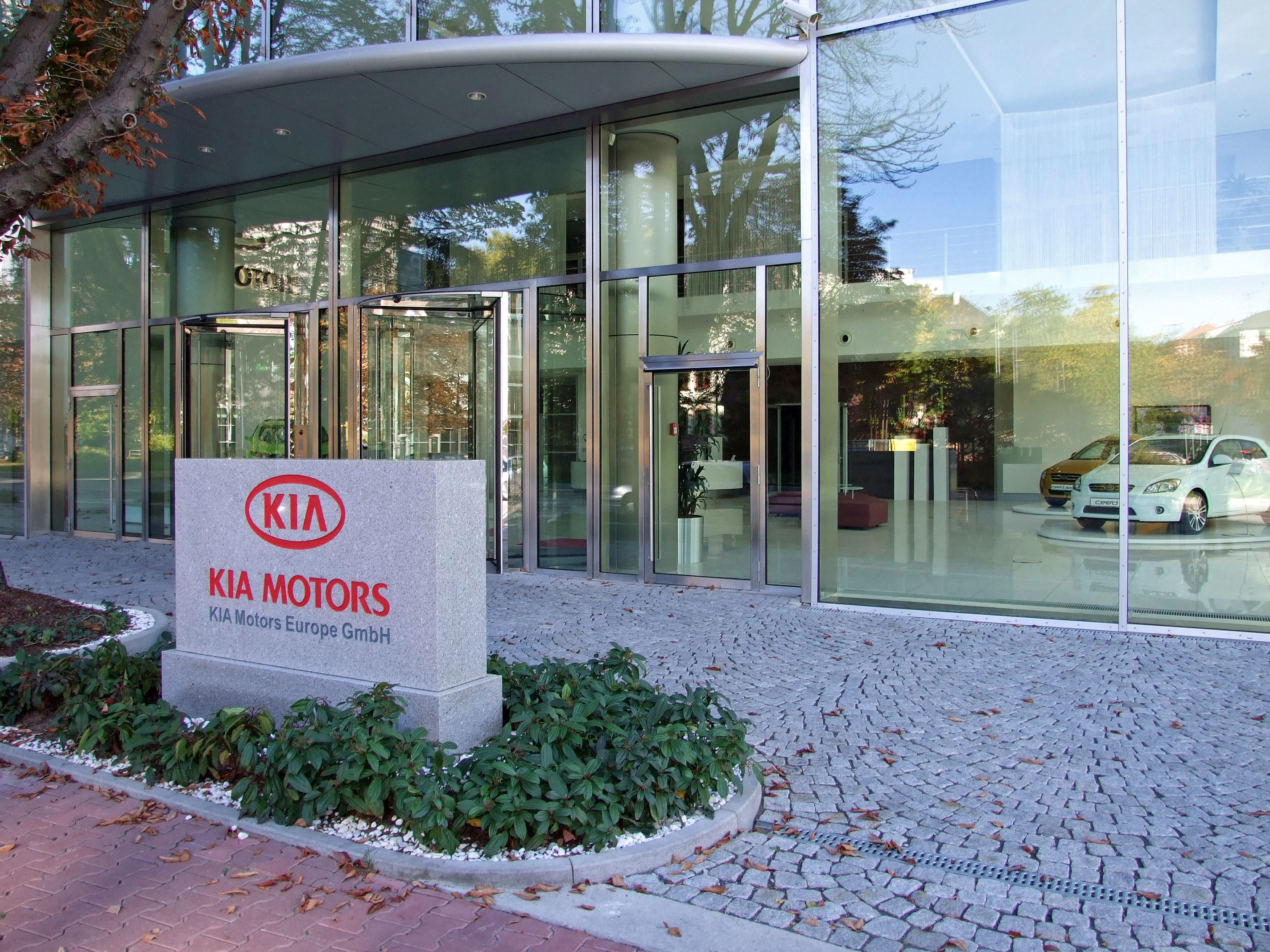 Zentrale von KIA Motors Europe, in Ffm, Theodor-Heuss-Allee, neben dem Messegelände